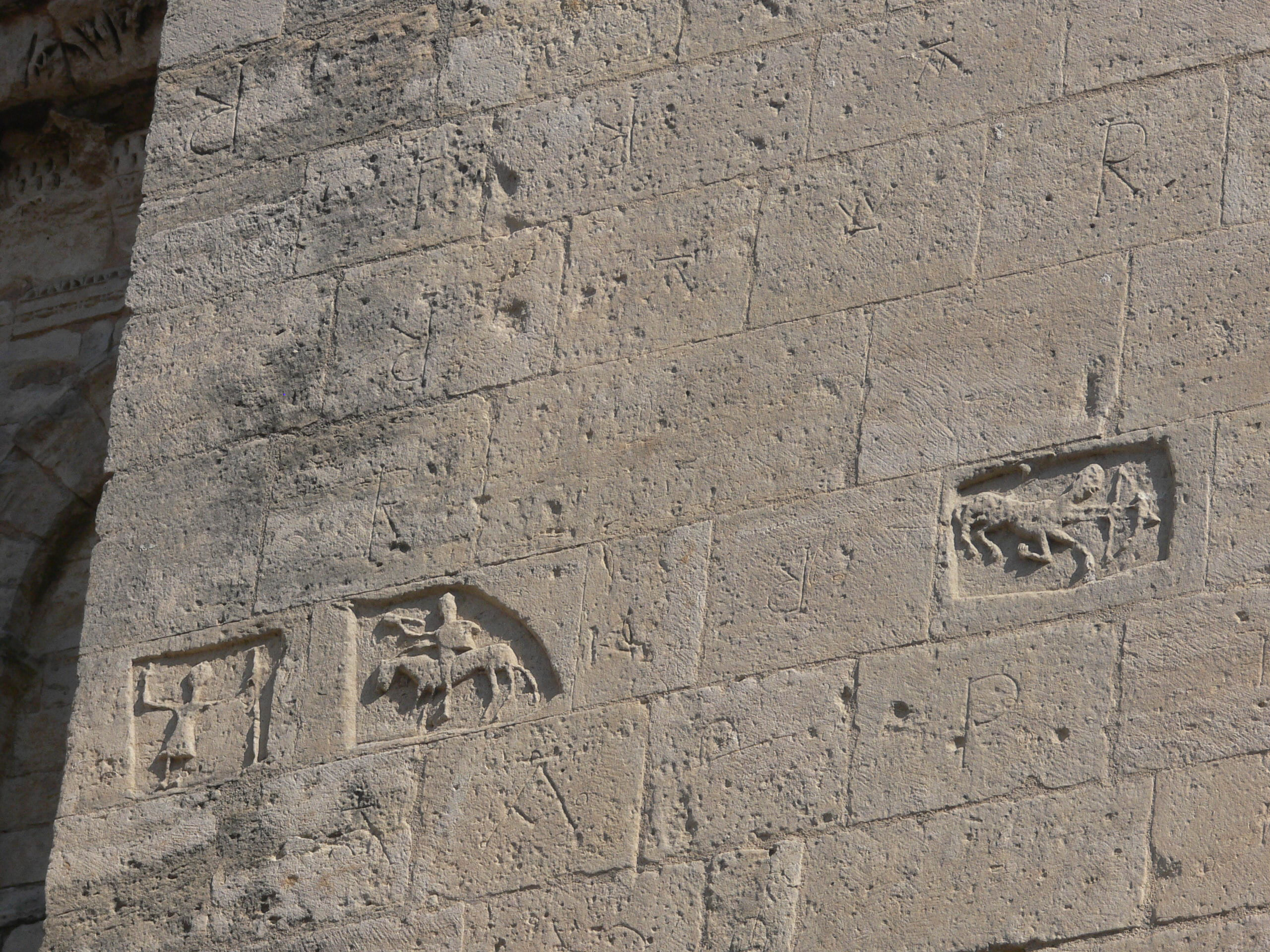 Saint-Paul-Trois-Châteaux - cathédrale